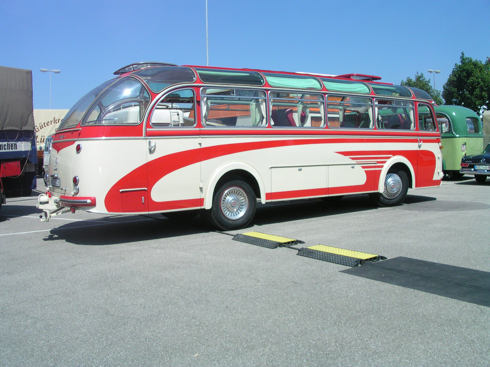 Oldtimer-Treffen bei Daimler-Chrysler in Wörth am Rhein. Mercedes-Benz O 317 Gelenkbus.